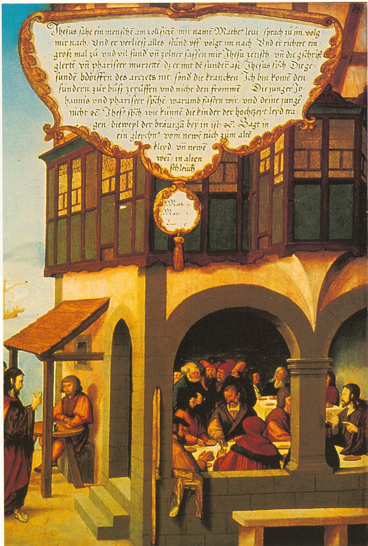 Altar mit drei Flügelpaaren